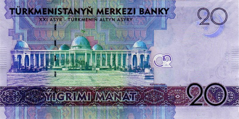 20 manat. Türkmenistan